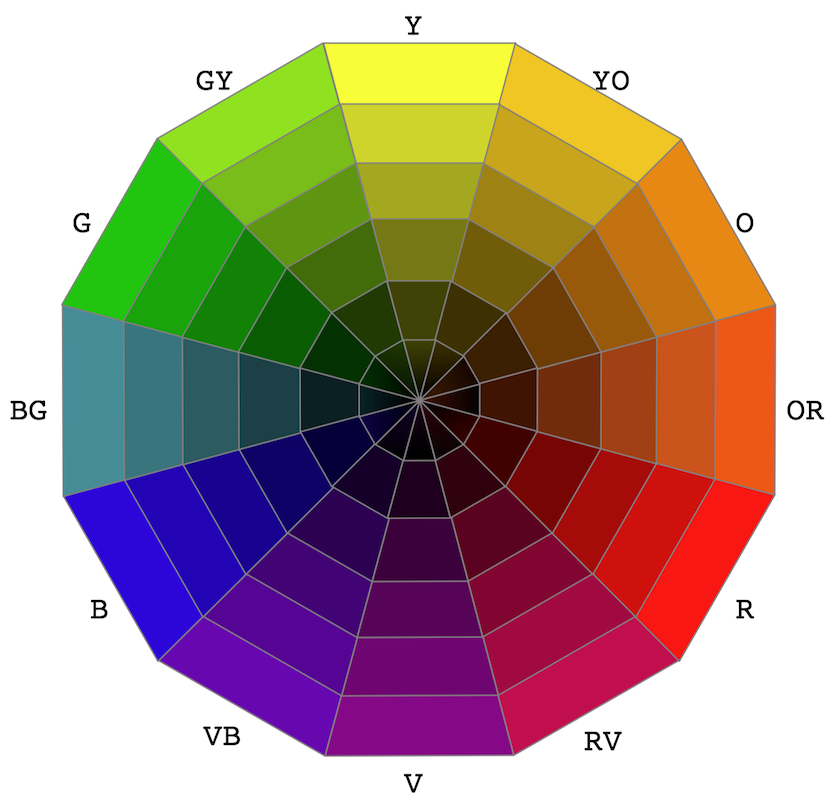 Emisfero scuro dei colori basilari secondo J. Itten